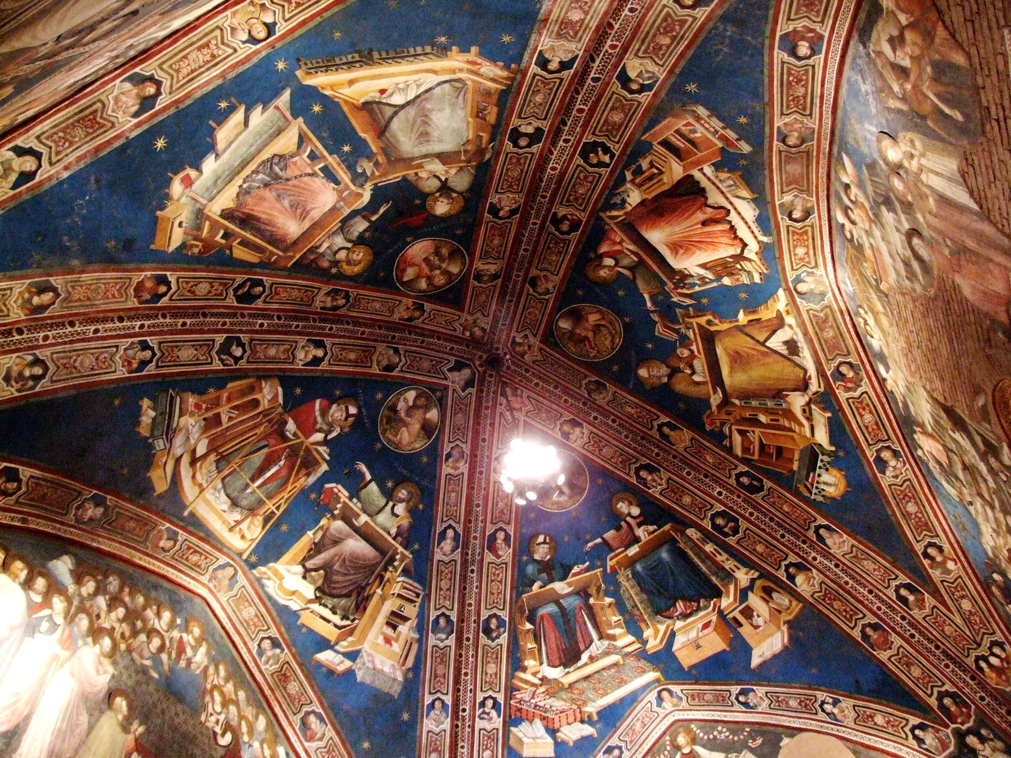 Cappellone di San Nicola Basilica di San Nicola a Tolentino Native nameBasilica di San Nicola da TolentinoLocationTolentino, ItalyCoordinates43° 12′ 28″ N, 13° 17′ 06″ E Established14th-17th centuriesWeb page control : Q3635709 VIAF: 129156352 GND: 1087192536